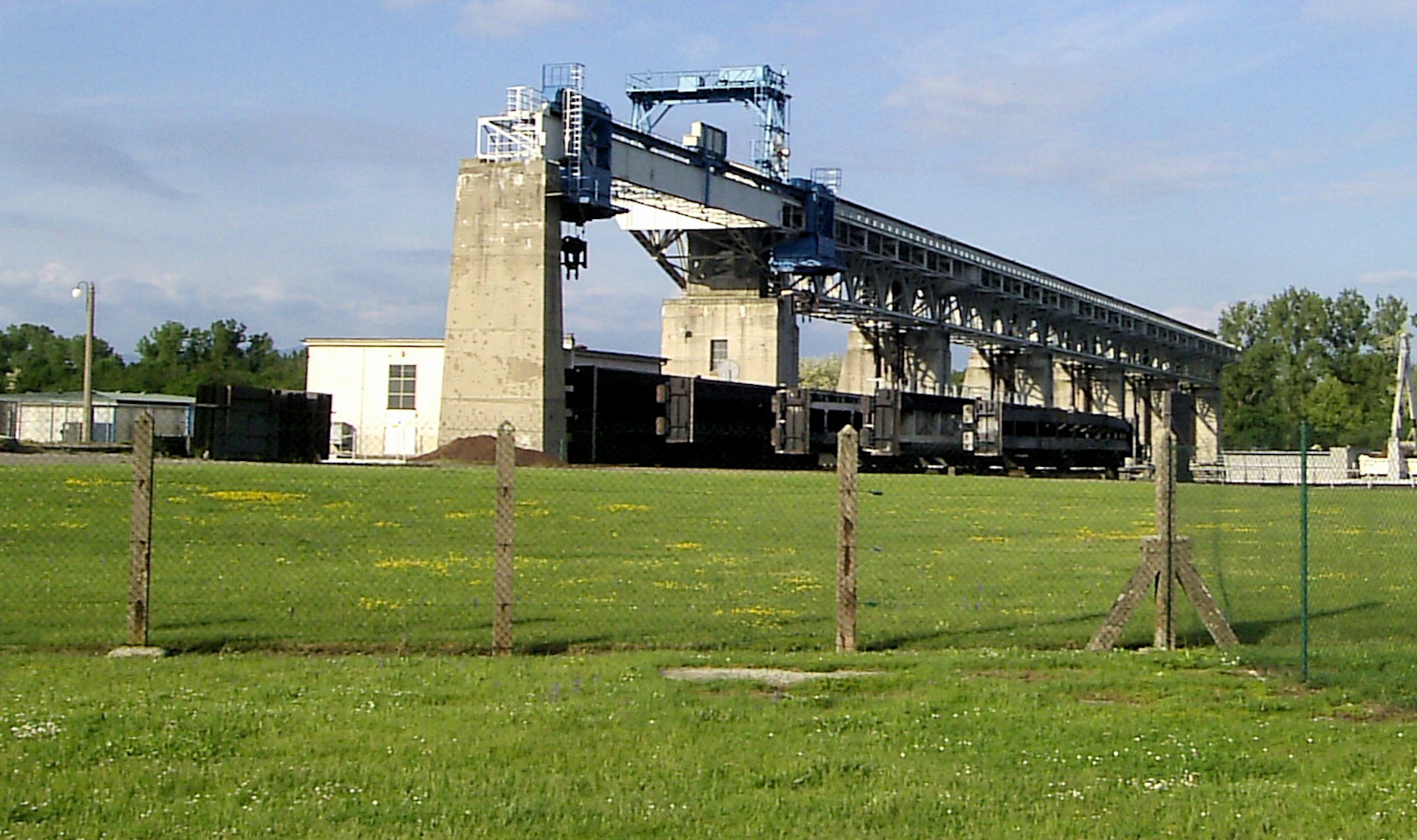 Stauwehr Märkt, von der Île du Rhin aus gesehen. Hier beginnt mit der Abschnürung des Altrheins der Rheinseitenkanal. Das Stauwehr regelt somit auch den Basler Rheinpegel.